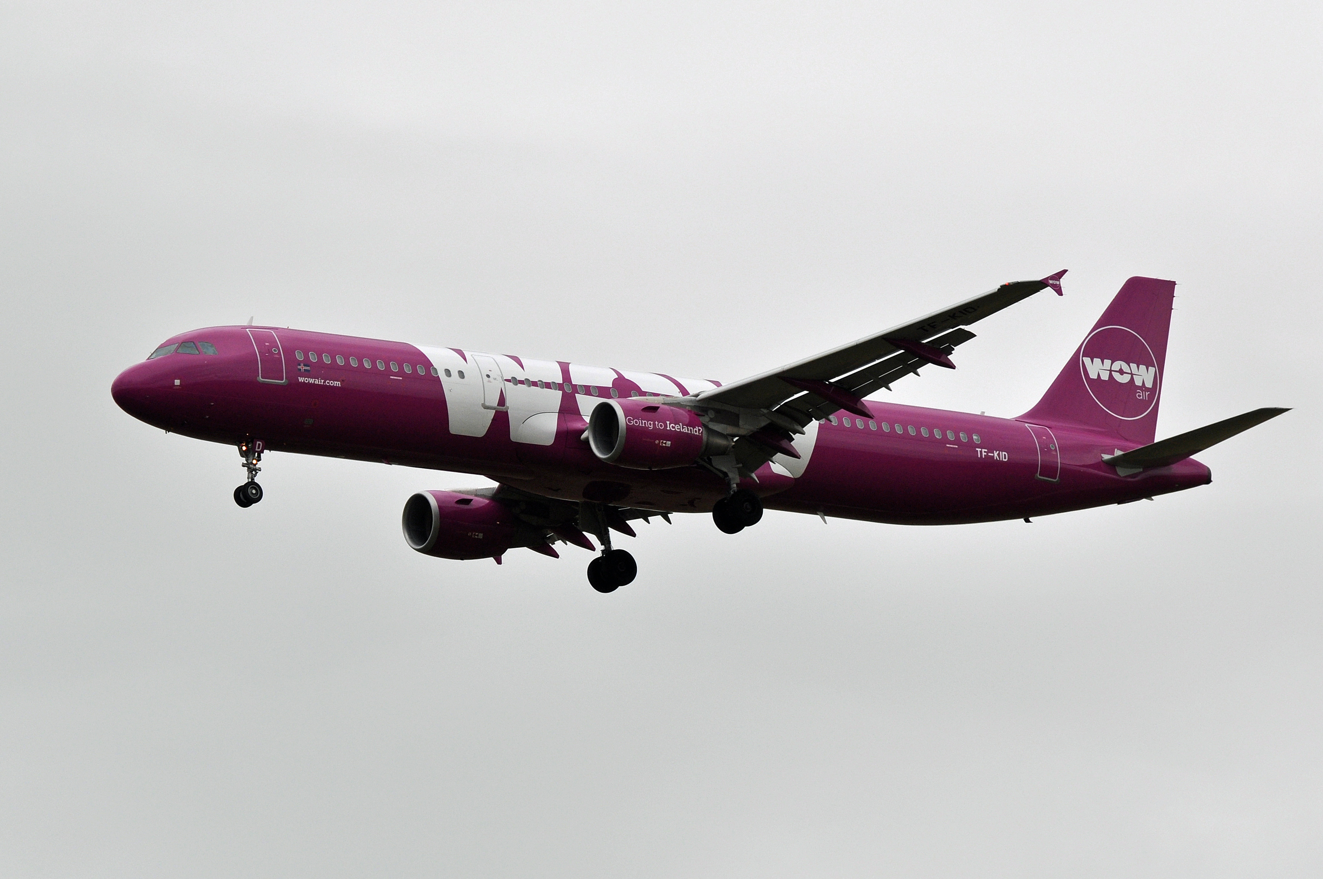 MSN 5681 A321-211 WOW AIR CDG AIRPORT EX UTAIR AS VP-BPS